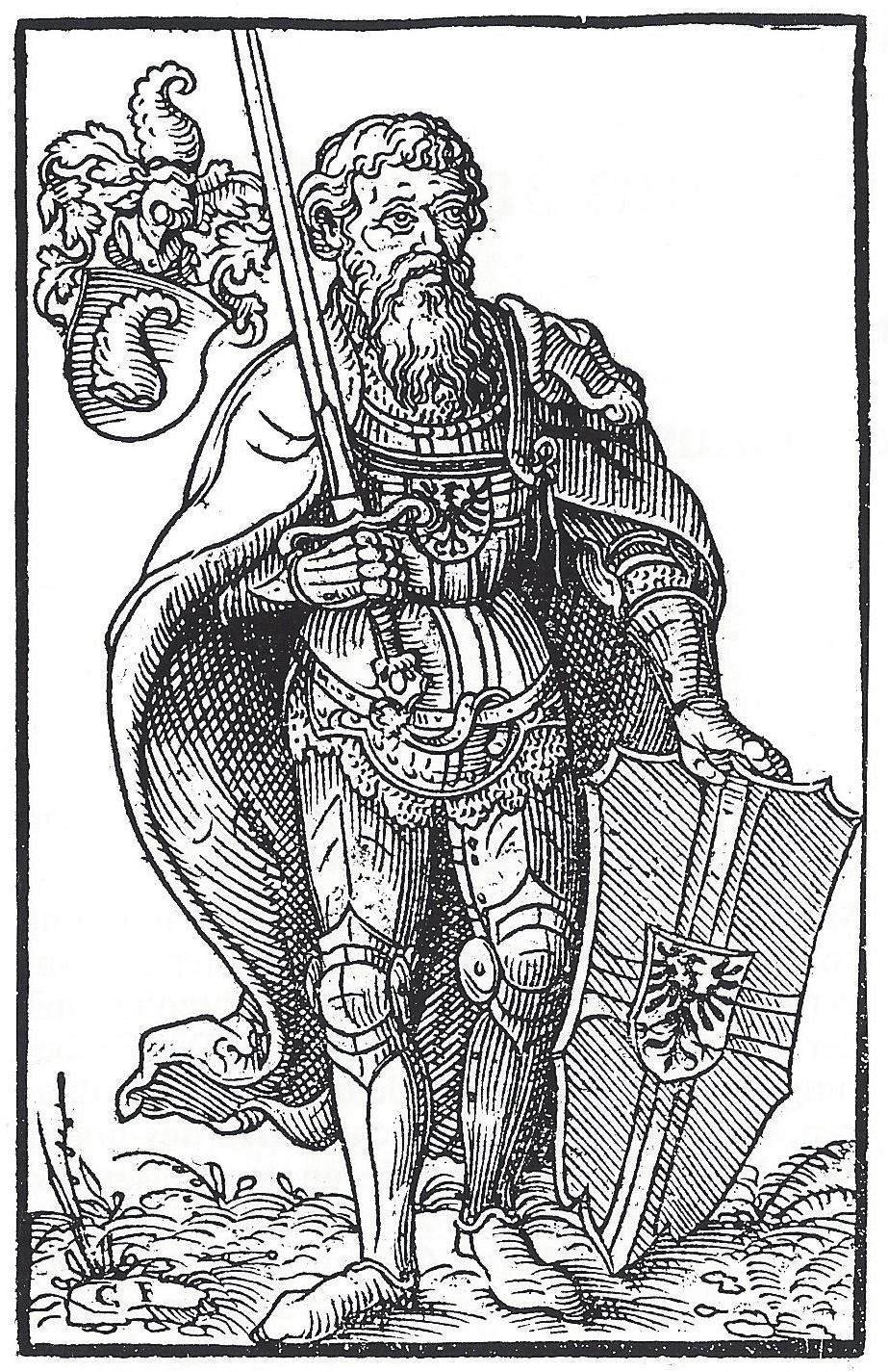 Lithographie von Hermann von Salza